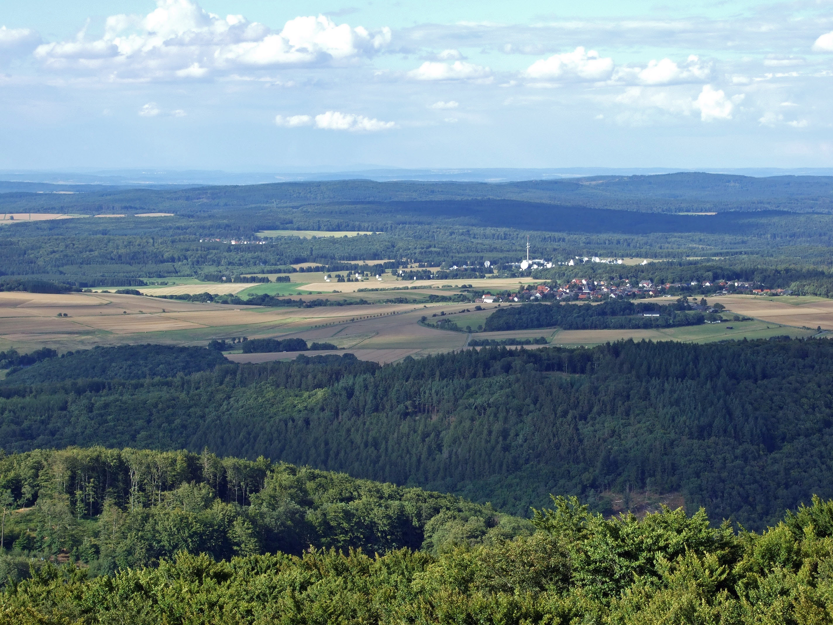 Die Erdfunkstelle Usingen, davor Merzhausen